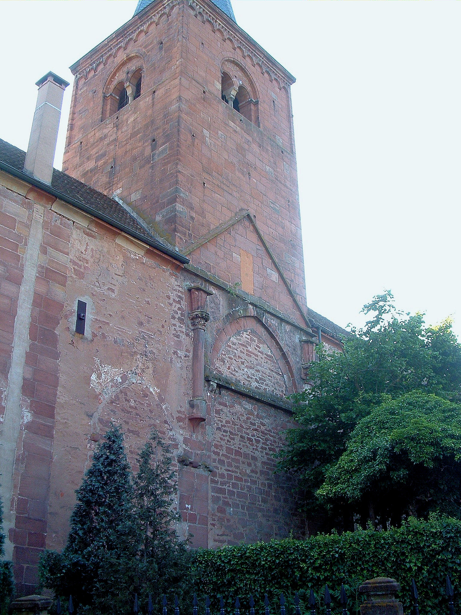 Neuwiller-lès-Saverne - Eglise Saint-Adelphe - Clocher et vestiges du choeur